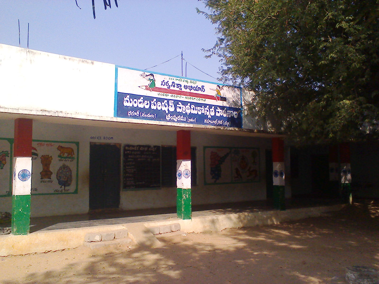 ప్రాథమికోన్నత పాఠశాల, భీంపురం